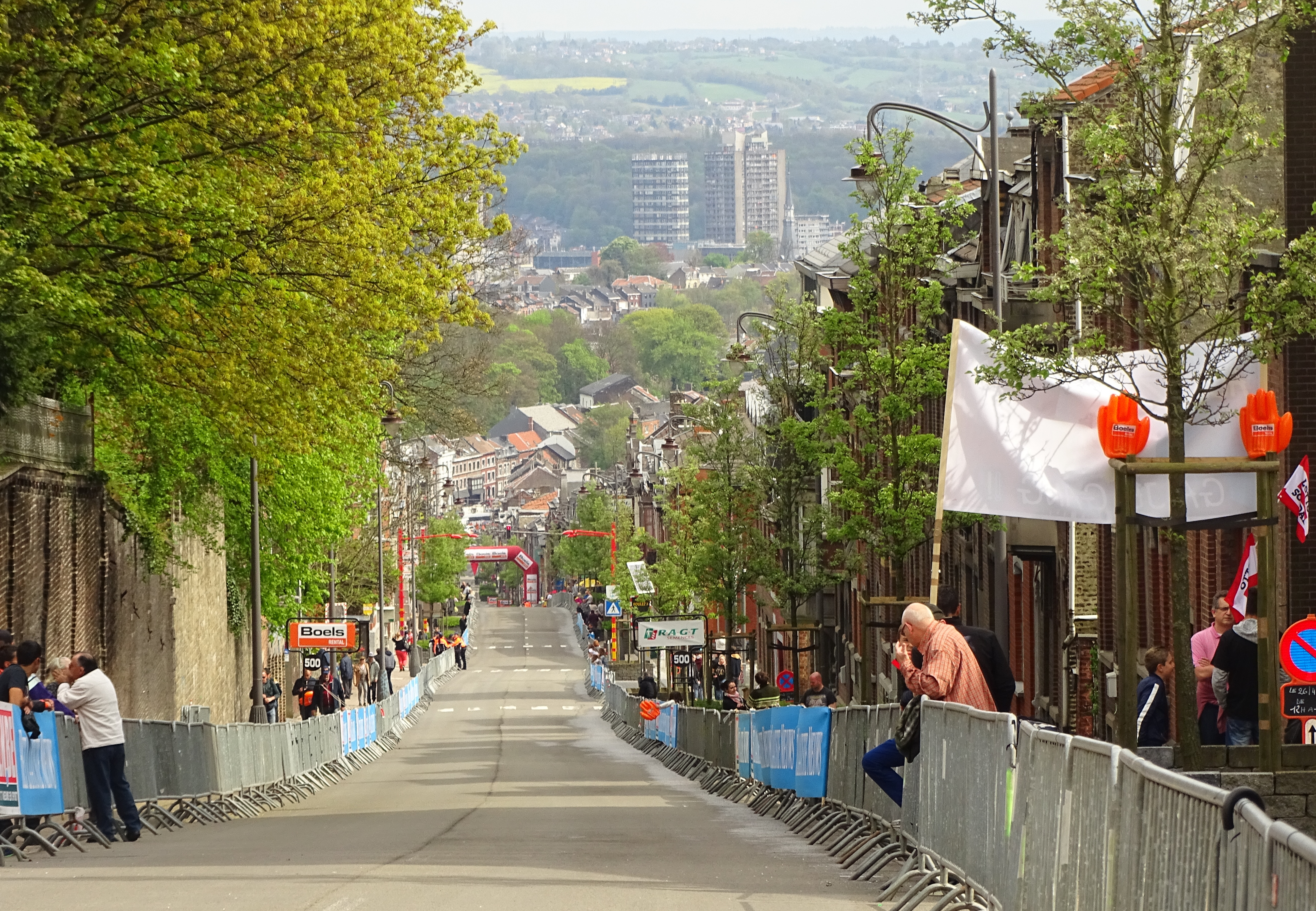 Reportage réalisé le dimanche 26 avril à l'occasion de l'arrivée de Liège-Bastogne-Liège 2015 à Ans, Belgique.